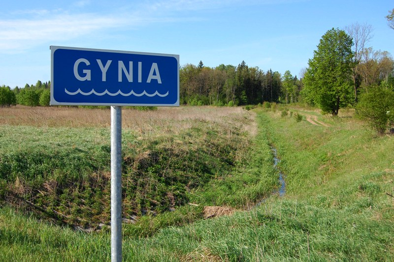 Gynia ties Ąžuolyno kaimu